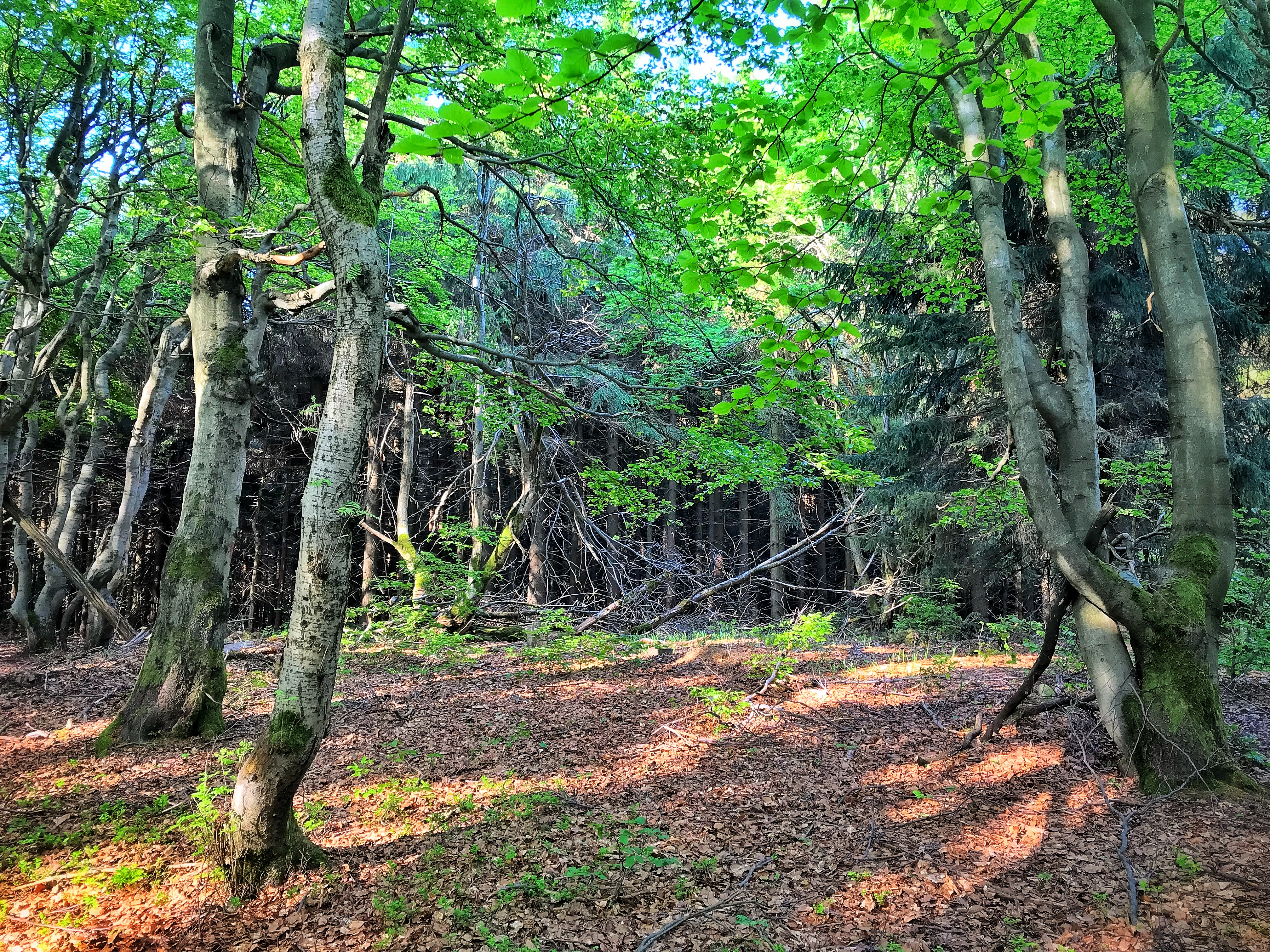 Vrchol Hlubockého hřebene v Ještědském hřbetu na rozhraní smrkového (na západě) a bukového (na východě) lesa.